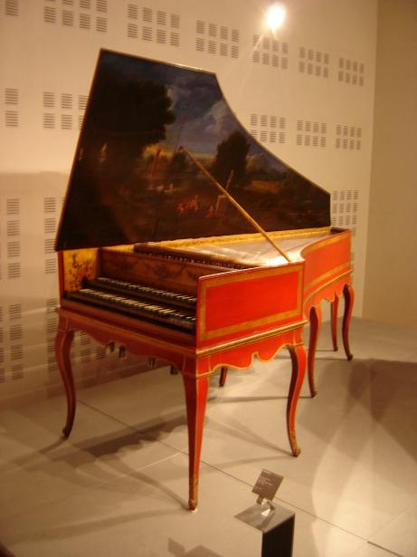 Clavecin fait par Dumont - France fin XVIIe siècle (1697); refait par Pascal Taskin en 1789 et restauré par Frank Hubbard en 1966 - Paris, Musée de la Musique.